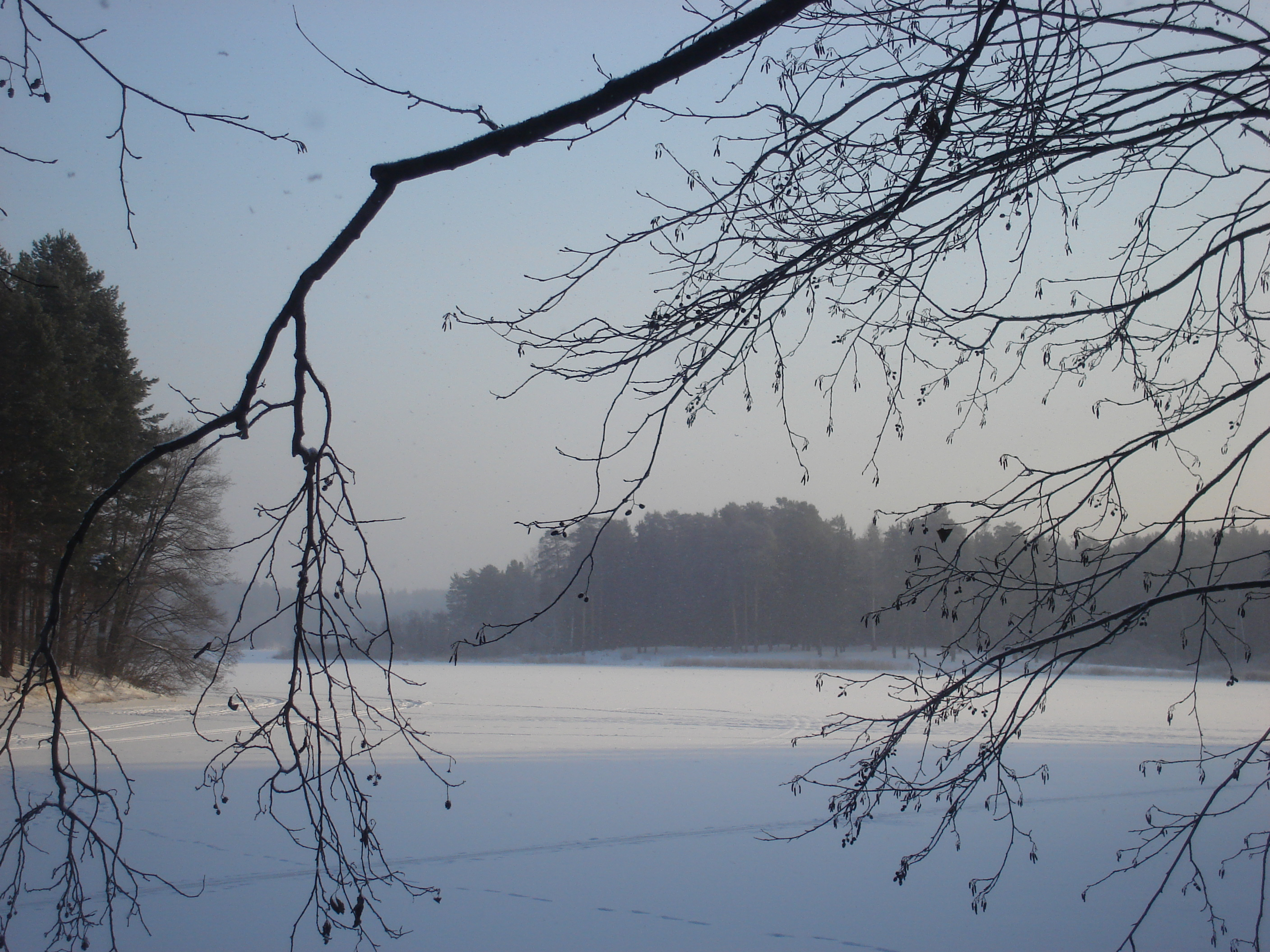 Frozen Lake Yalchik